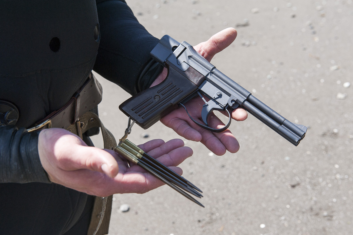 СПП-1М - Тактико-специальное занятие с отрядом по борьбе с подводными диверсионными силами и средствами Тихоокеанского флота (п-ов Камчатка)